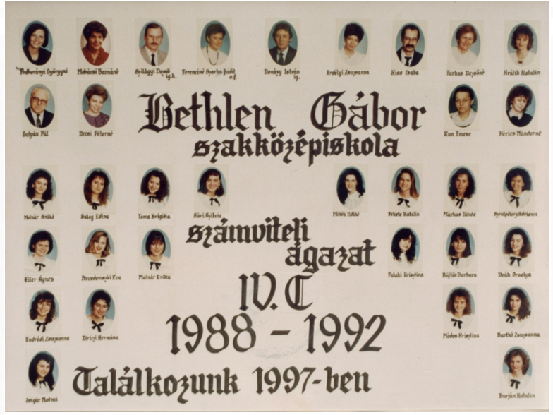 Az egyik elsőként érettségizett osztály a Bethlenben 1992-ben (Bethlen Gábor Szakgimnázium), Budapest